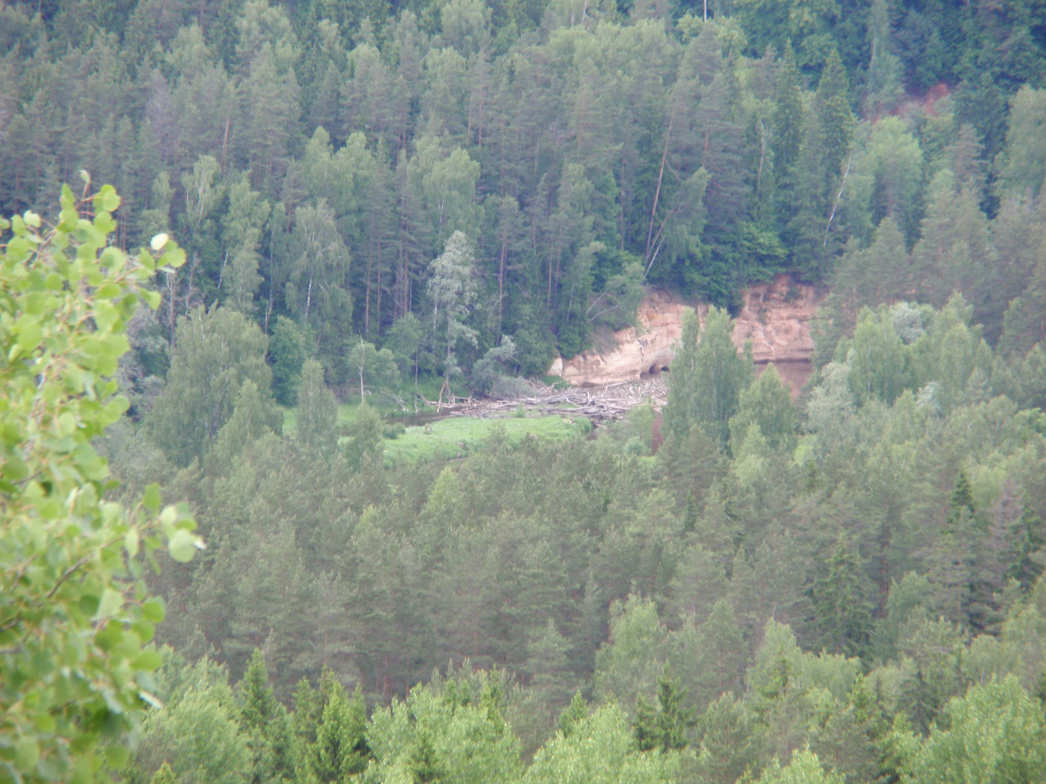 Gaujas ieleja Līgatnē